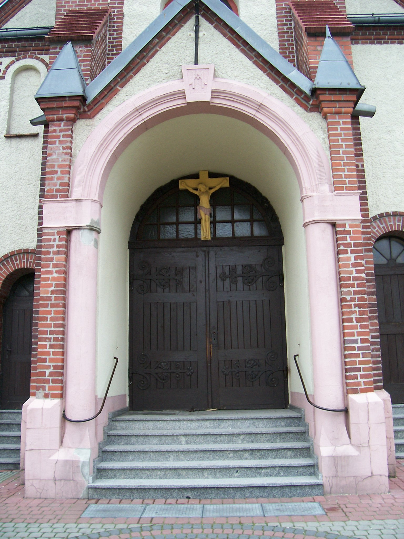 Kościół pw. Najświętszej Marii Panny w Krowiarkach: portal